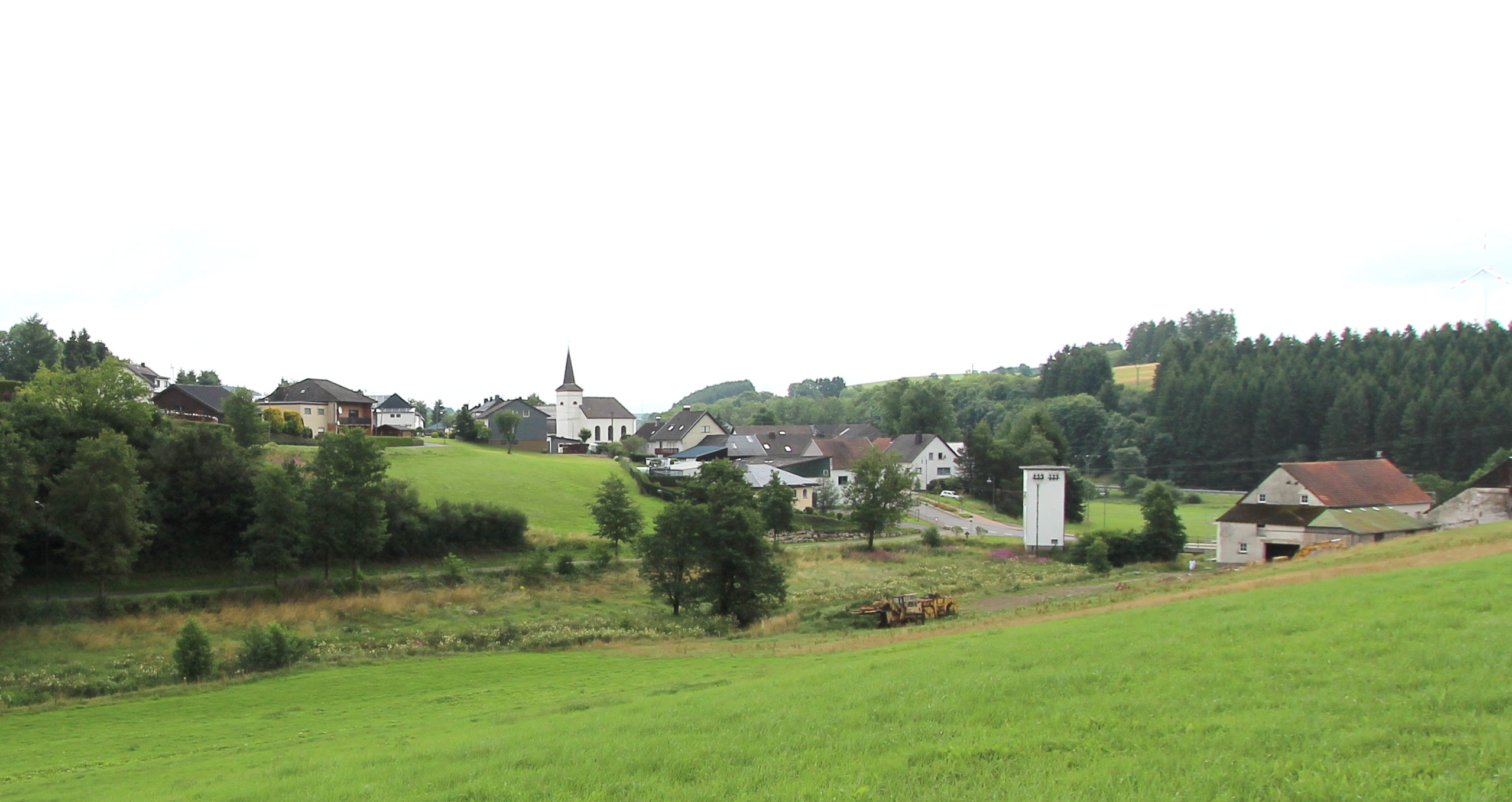 54597 Neuendorf, südwestlich vom Ort. Aufnahme von 2017.